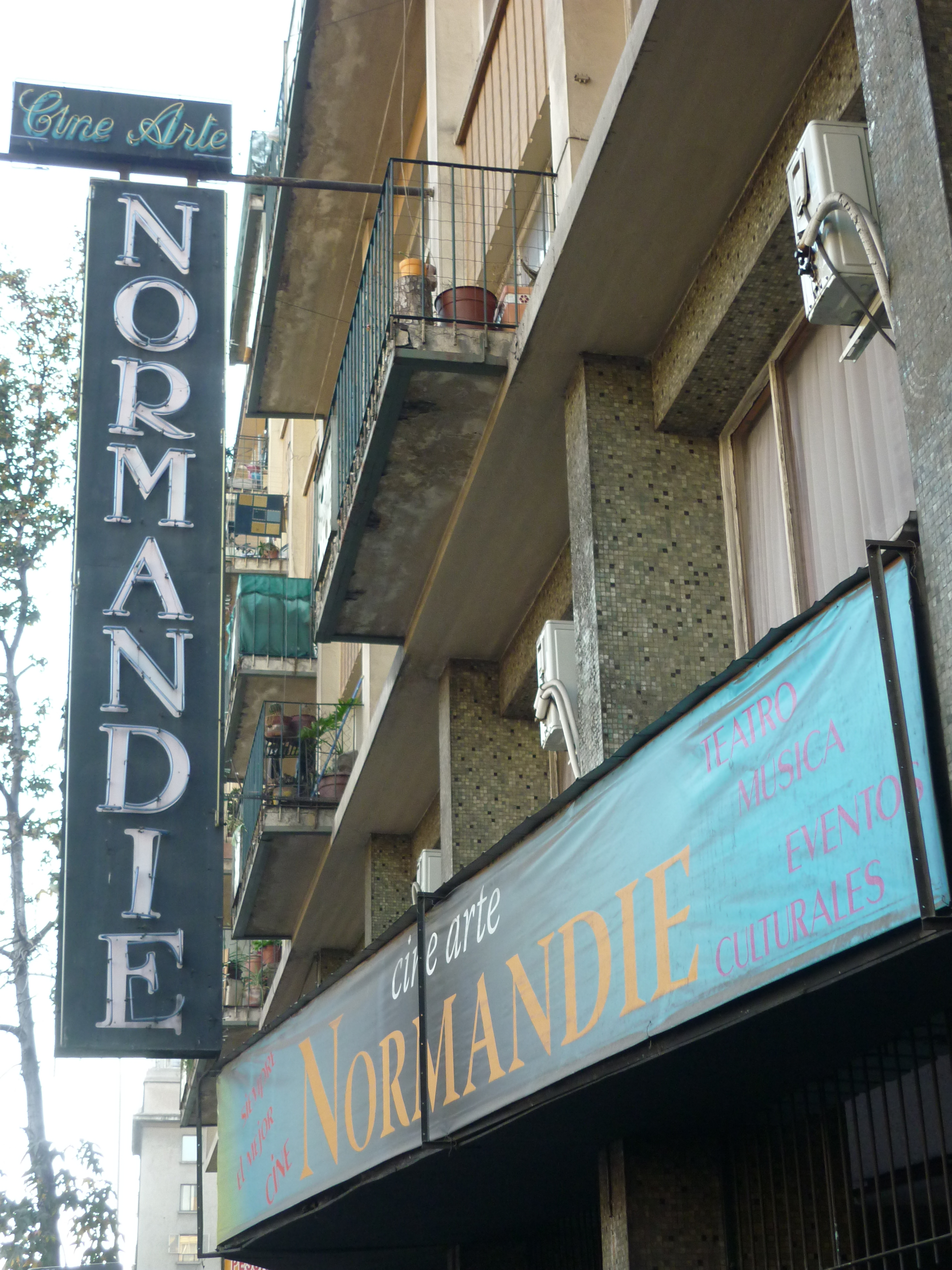 Cine Arte Normandie ubicado en calle Tarapacá 1181, Santiago de Chile.